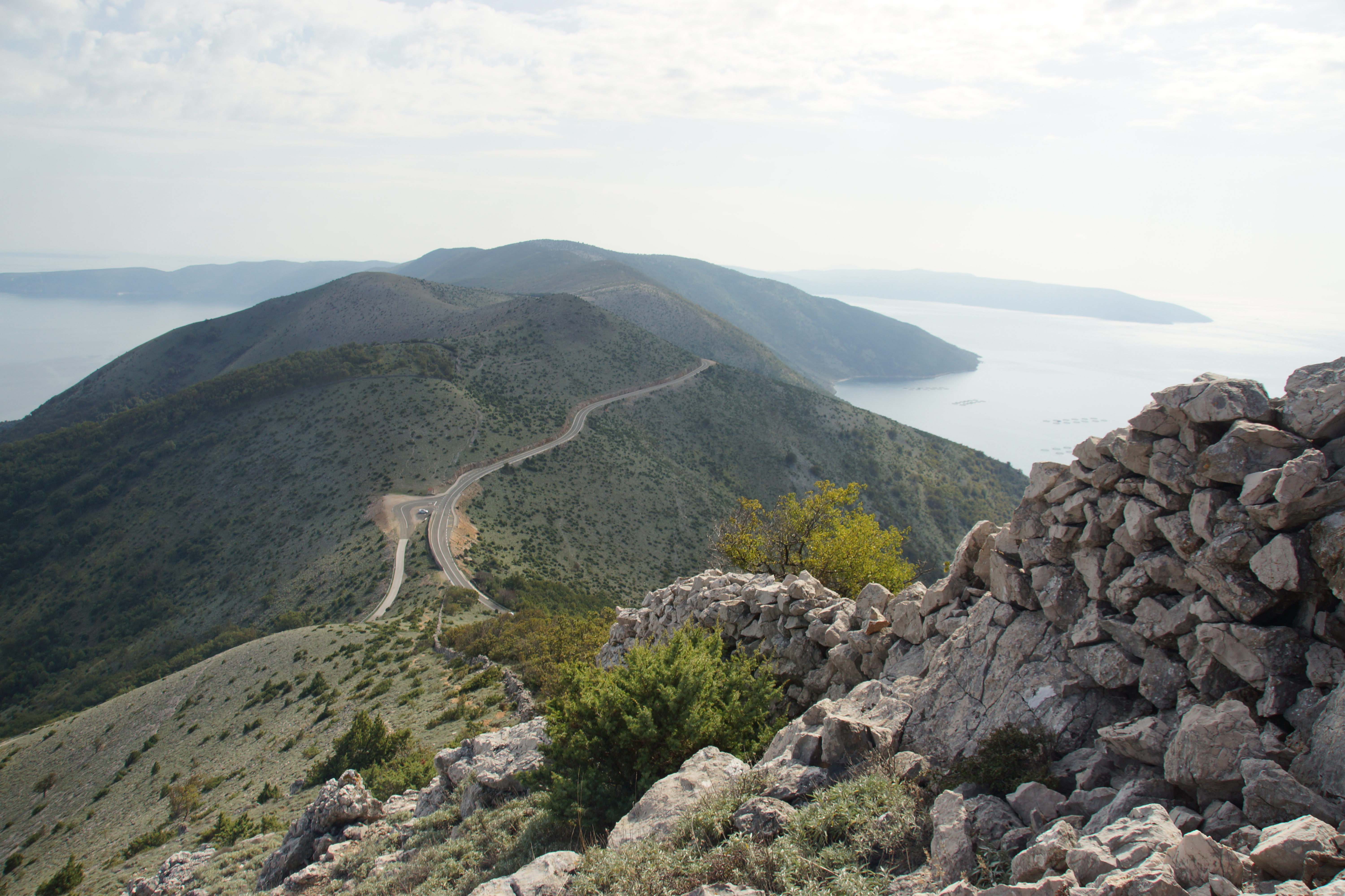 Blick vom SIS